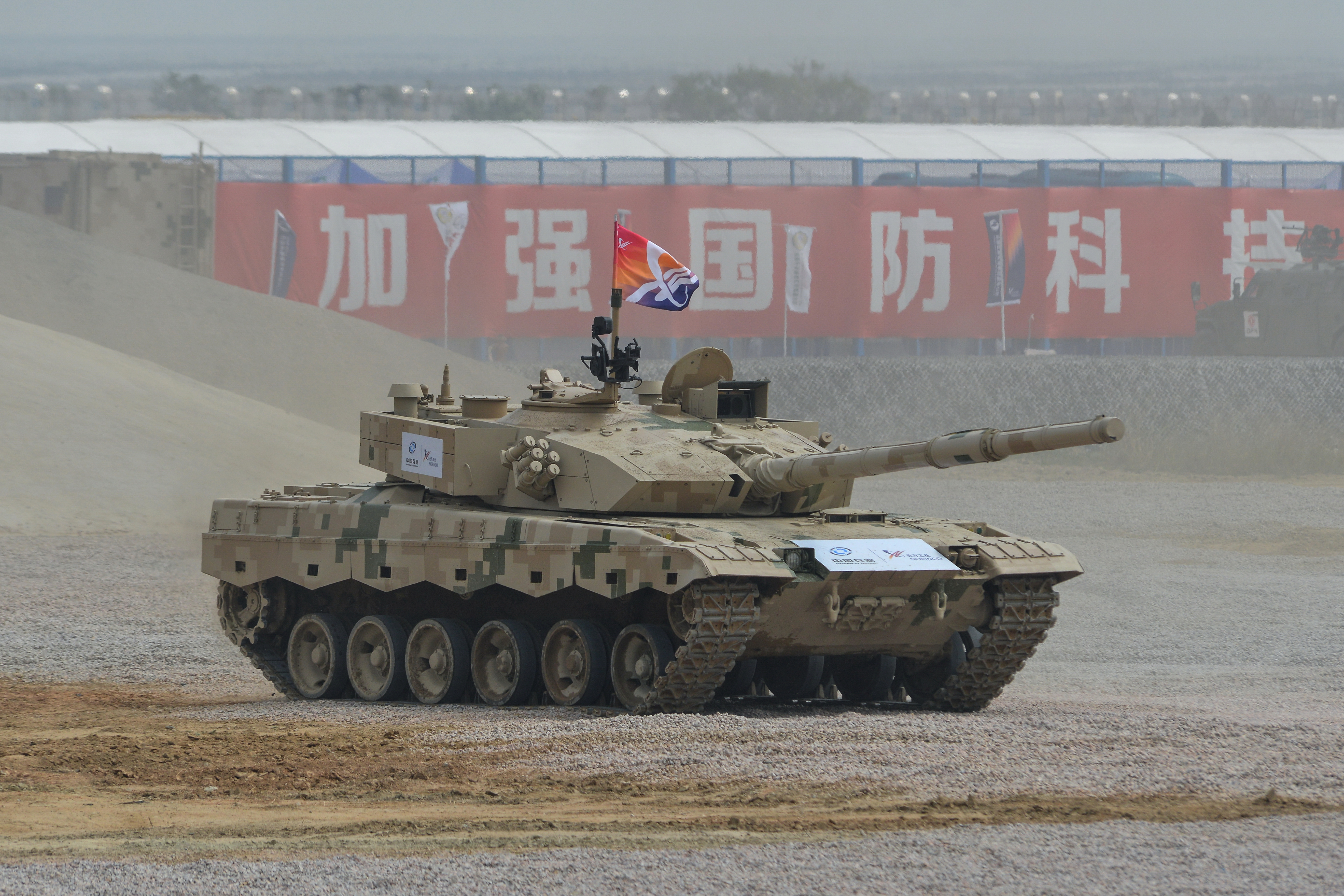 NORINCO VT2B Tank